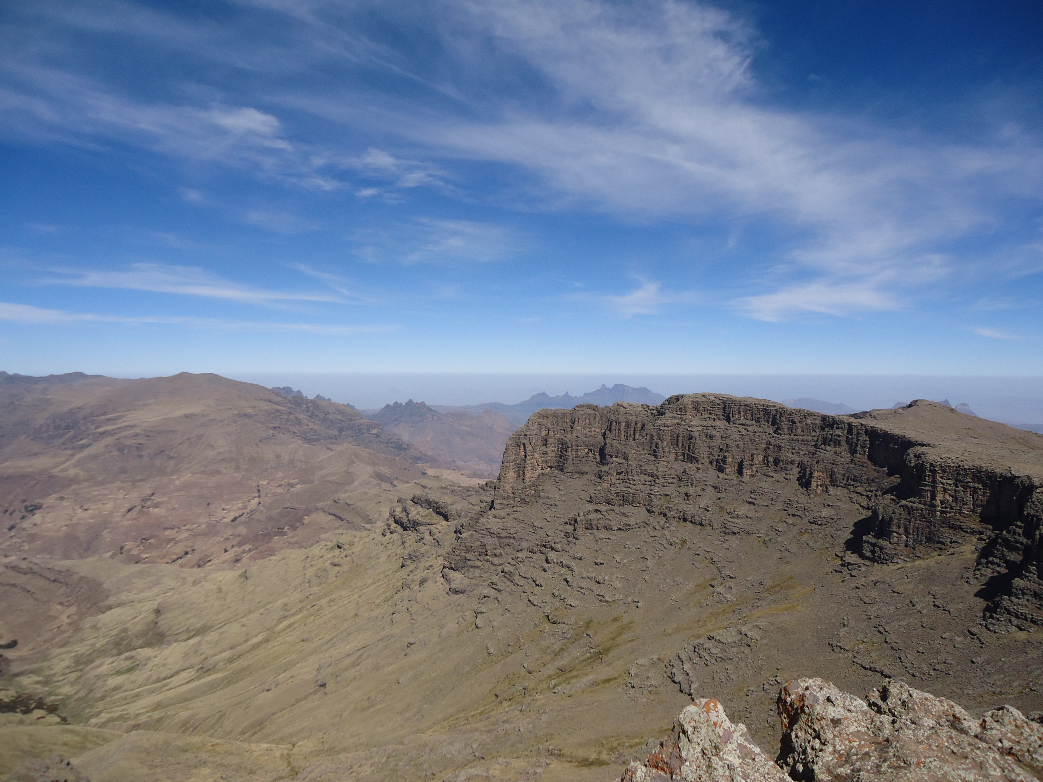 Blick vom Ras Dejen nach Nordosten